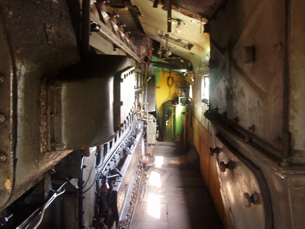 东风型内燃机车的发动机